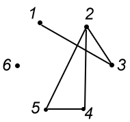 (2,5,1,4,3,6)的置換圖.